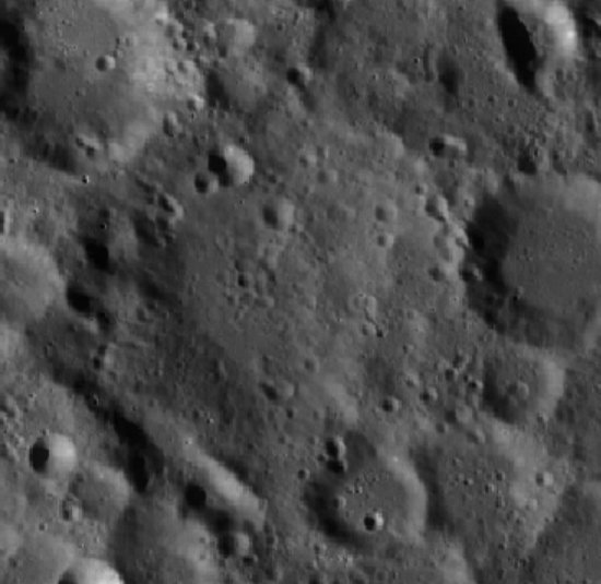 Cráter lunar Becquerel. (Imagen LRO)